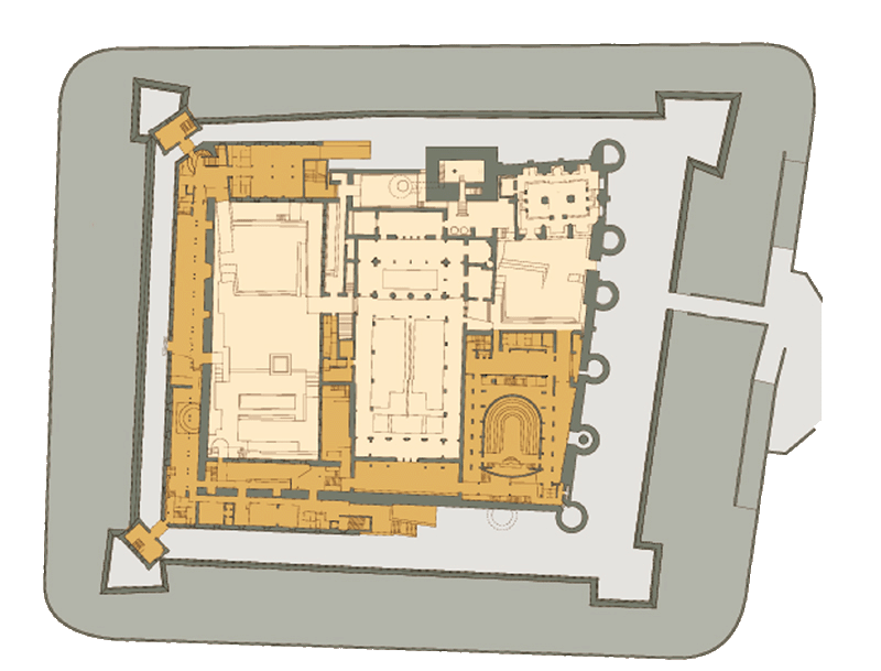 Plano de la Alfajería de Zaragoza